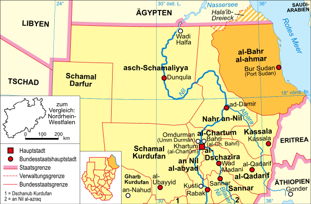 politische Karte des Sudan (Bundesstaat al-Bahr al-ahmar)